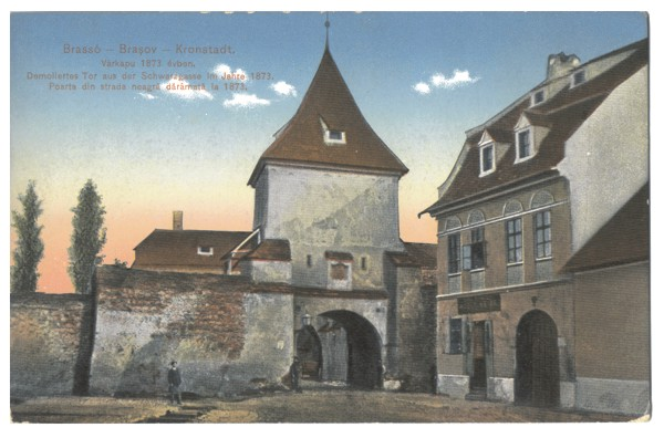 Brassói várkapu 1873-ban régi képeslapon